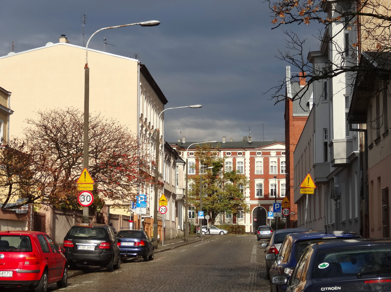 Ulica Mikołaja Reja w Bydgoszczy